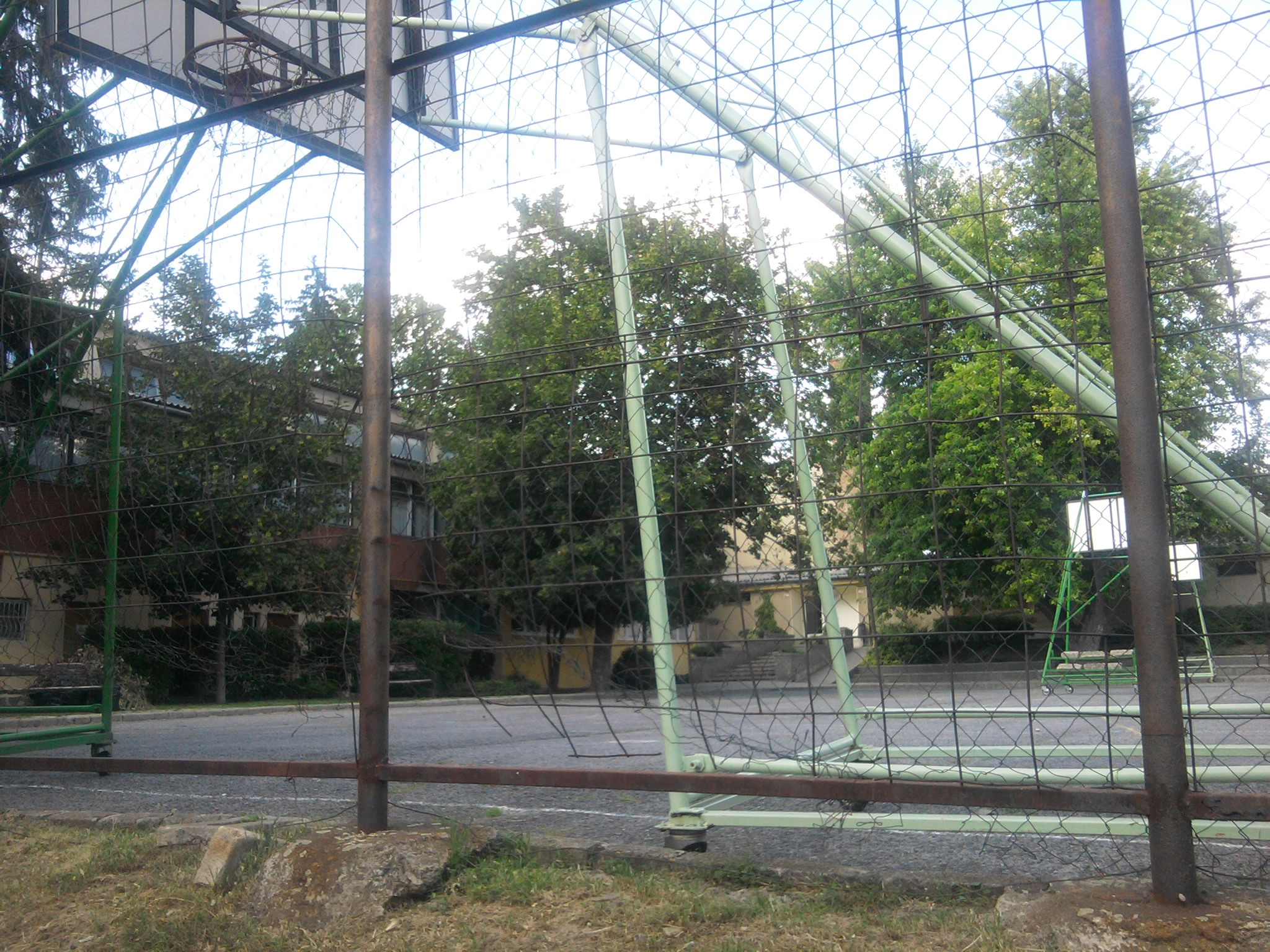 A Nagy Sándor József Gimnázium udvara Budakeszin